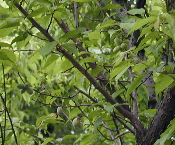 越後七不思議の一つである、梅護寺の「八房の梅」。